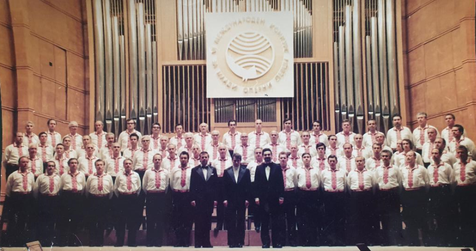 Участие на хор "Кавал" на VI Международен конкурс за млади оперни певци, 1975 г.